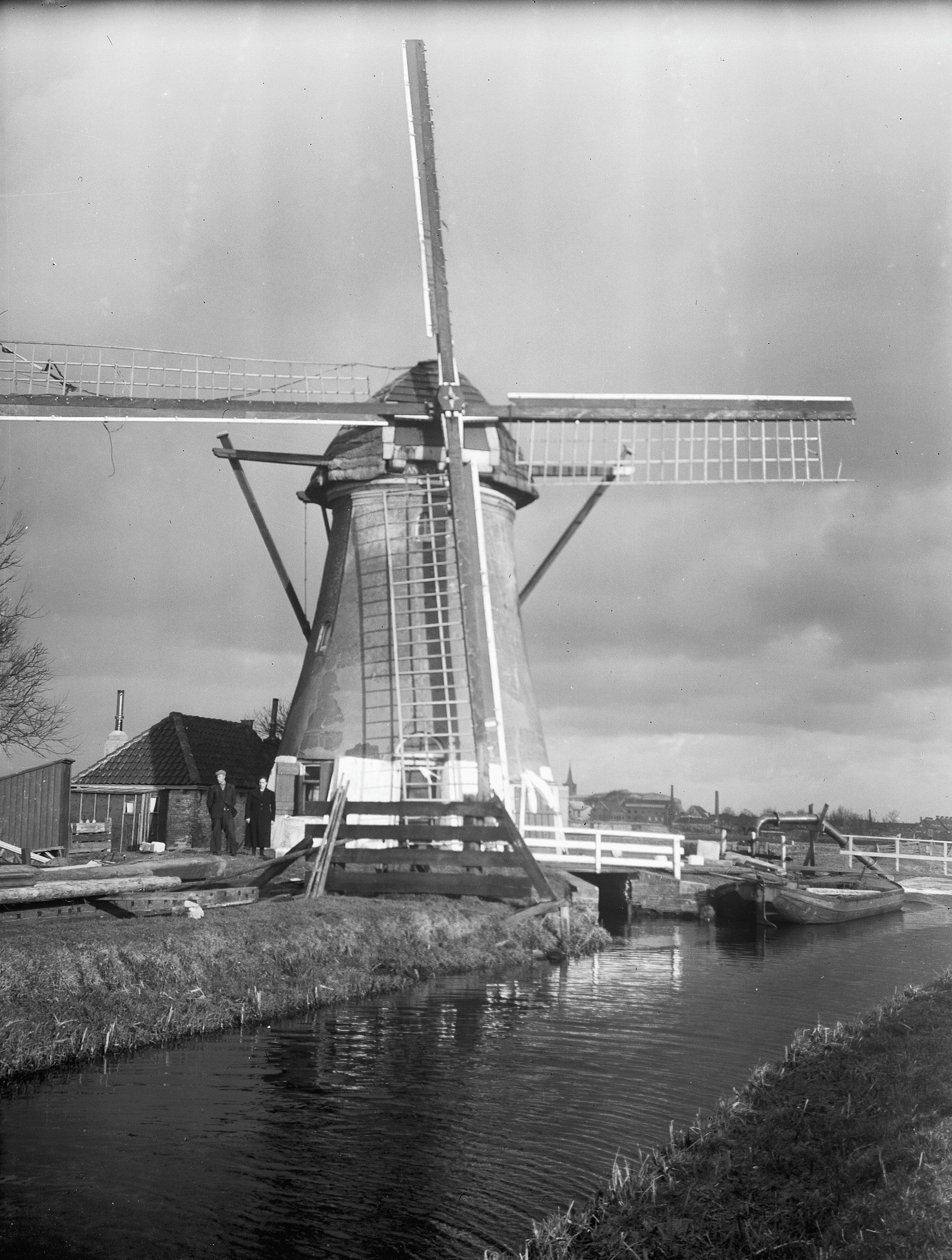 Bosch- en Gasthuispolder (ook genoemd: de Eendracht); aan het water gelegen molen met poserend molenaarsechtpaar ernaast (opmerking: Verdwenen molen)